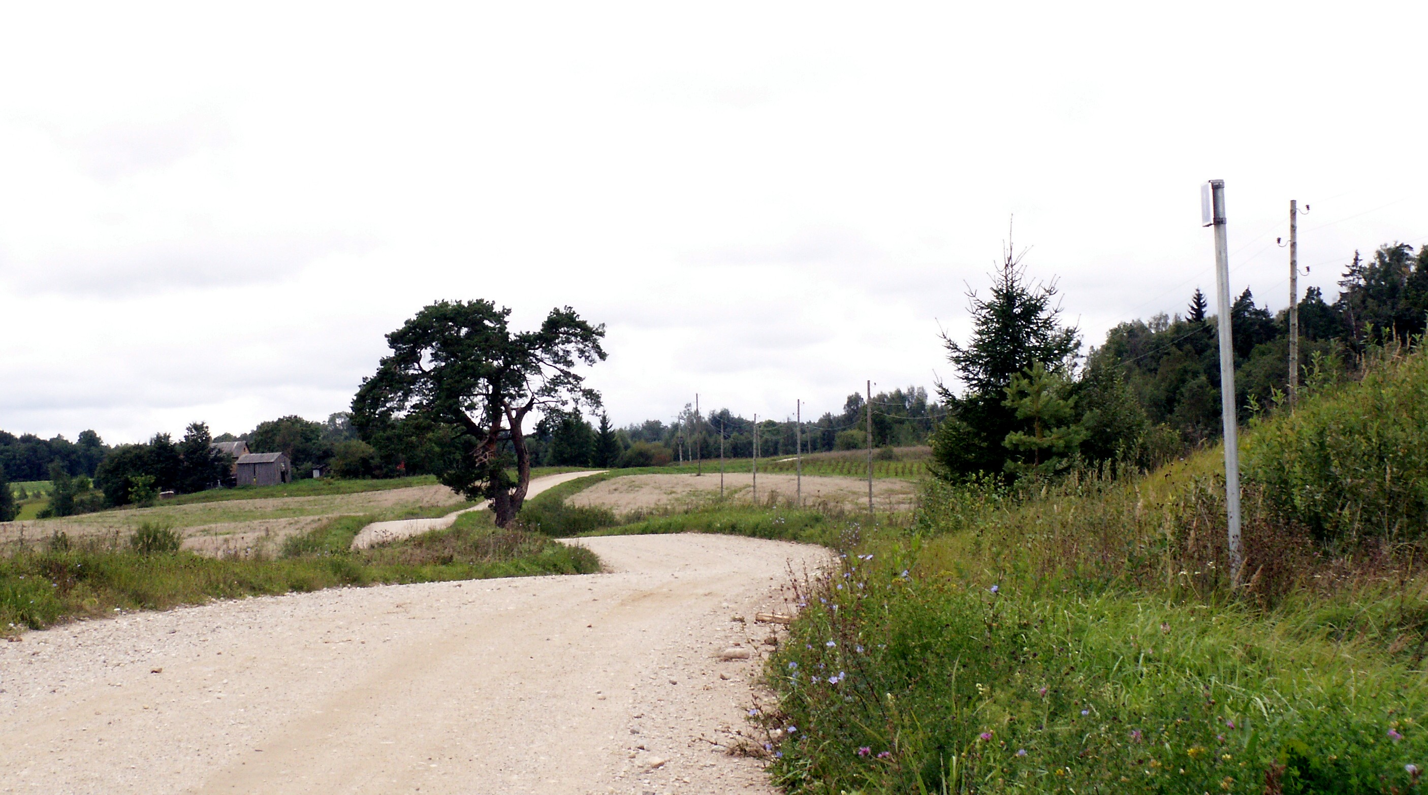 Mūrišiai, Ylės pagastas, Latvija